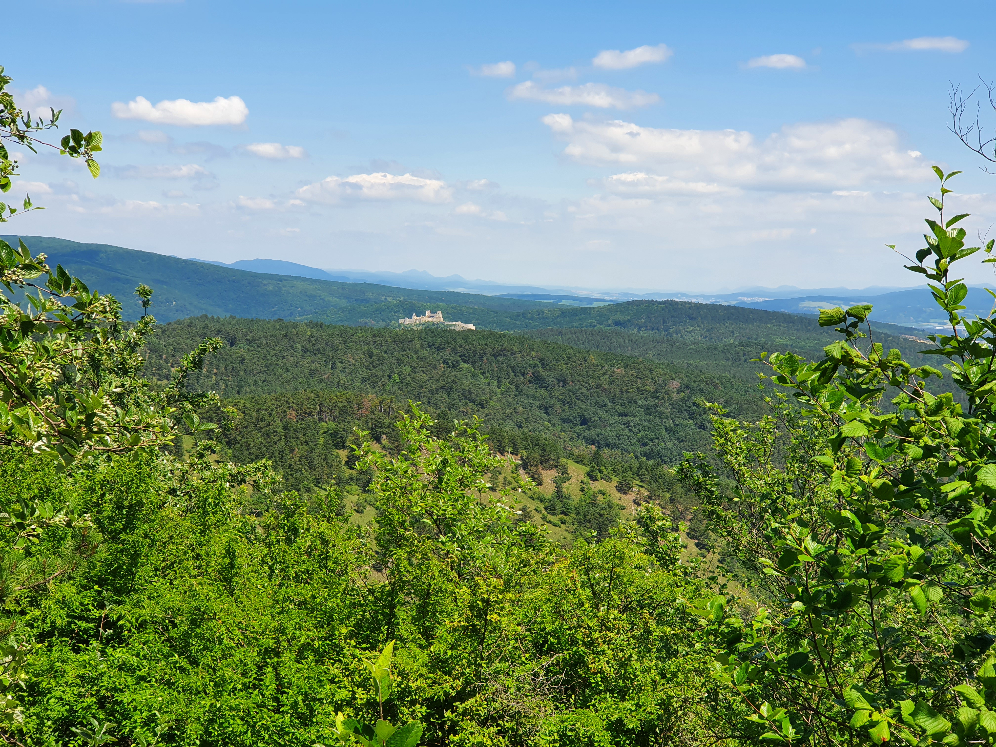 Výhľad na časť rezervácie a Čachtický hrad